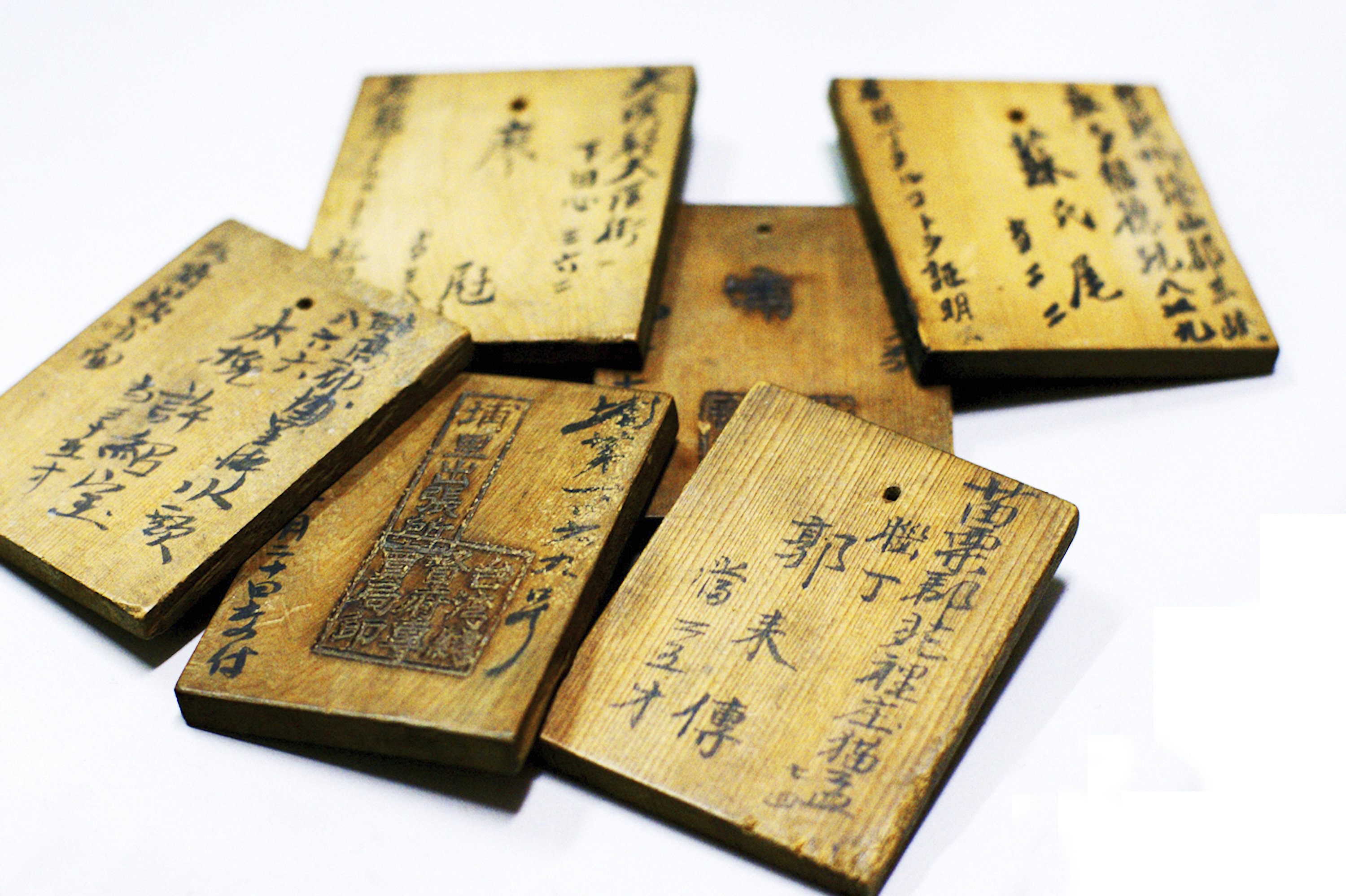 【腦丁牌】日治時期台灣施行樟腦專賣制度，採製樟腦的工人，需要經過專門考試，取得由台灣總督府專賣局發出的腦丁執照，方可由腦長進行工作聘僱。